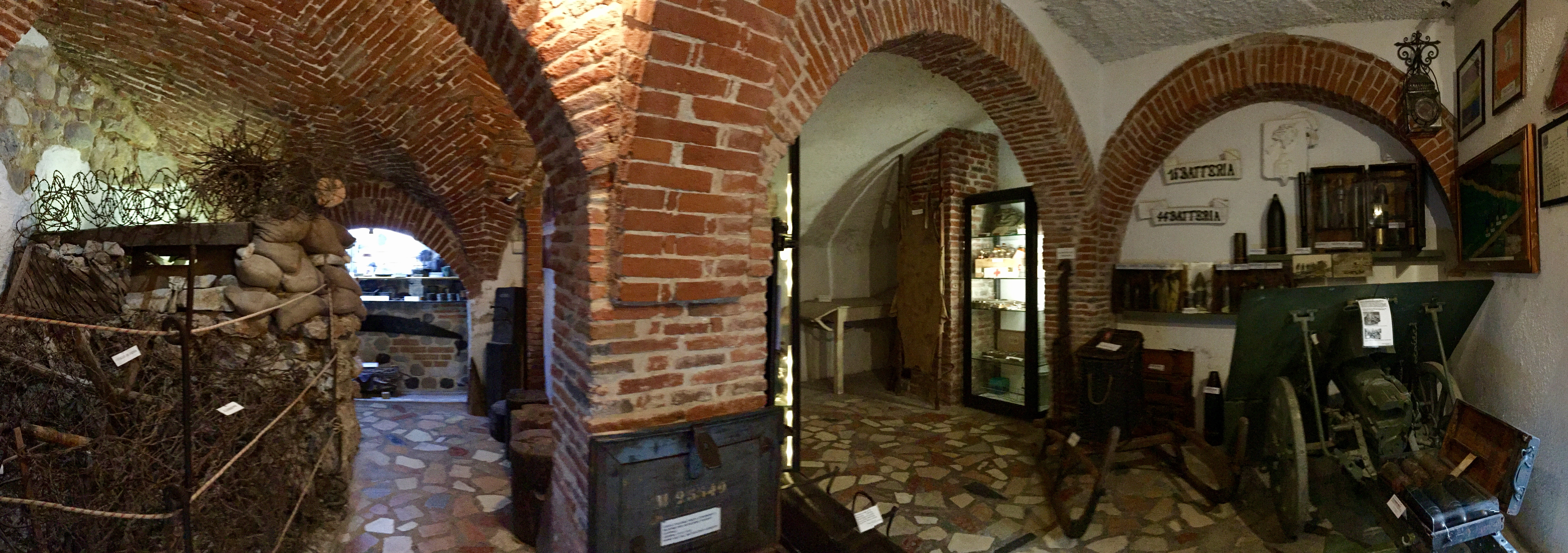 Panoramica secondo piano